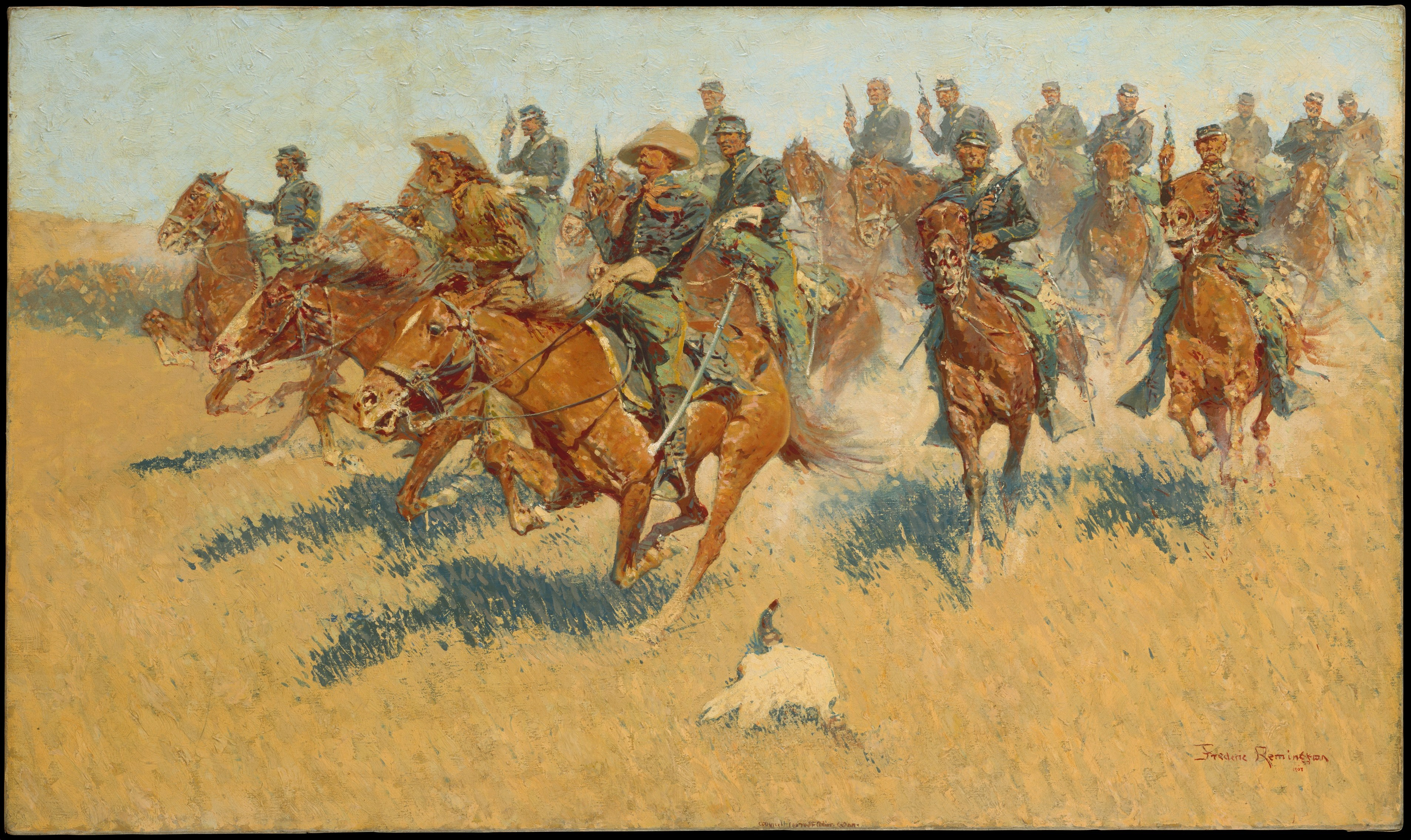 Oil painting